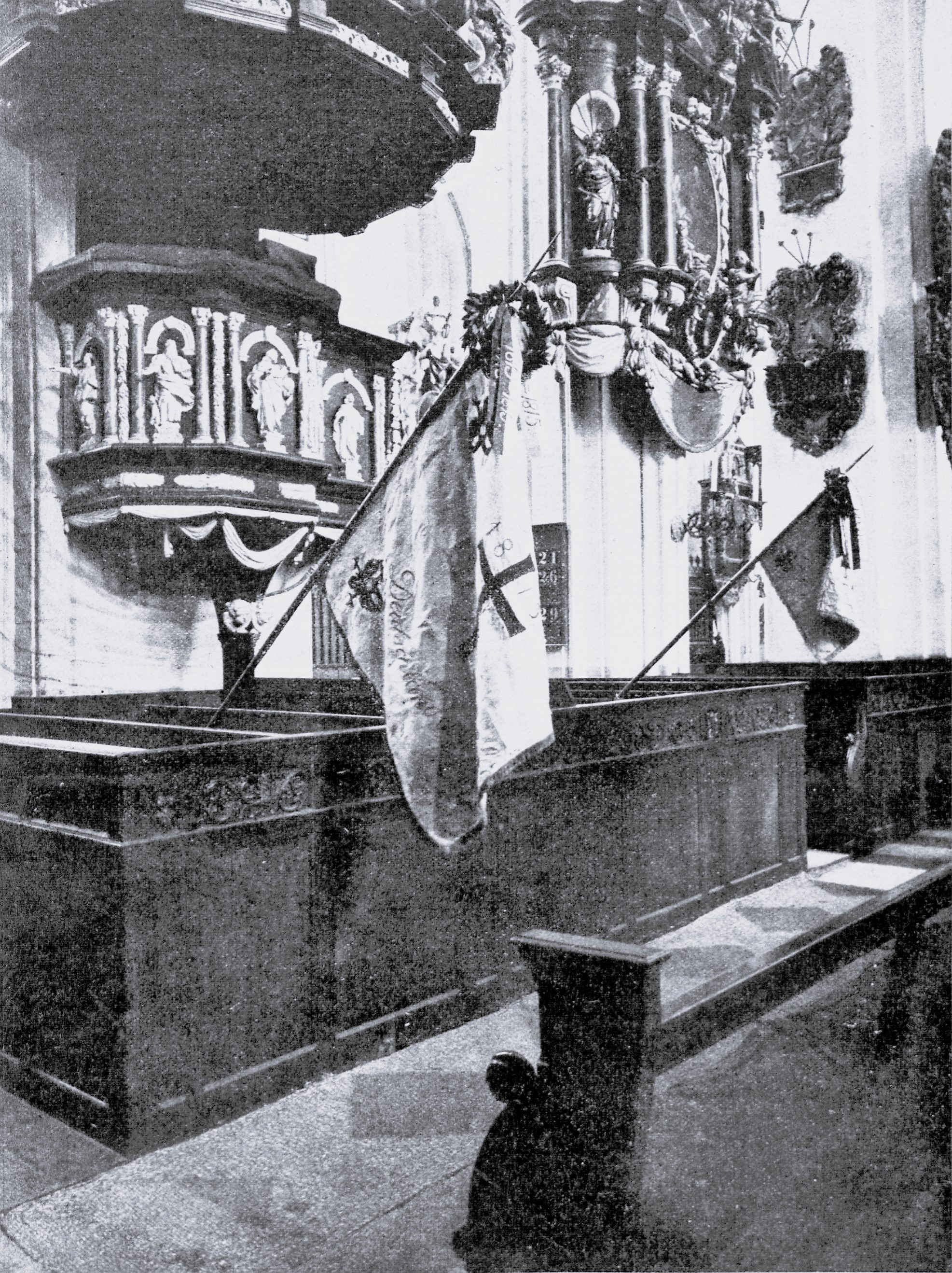 Fahne und Standarte der Hanseatischen Legion unter der Kanzel zu St. Marien unmittelbar nach der Bekränzung am 9. März 1913. 1. Fahne (die große) der Fußtruppen; . Standarte der berittenen Truppen. Dekor: aus roten Tuchauschnitten die Kreuze der Legion, in den Ecken aus schwarzem Stoff geschnittene Adler,. Fond der Fahnentücher: weißgelbe Seide. Inschriften: „Gott mit uns“ und „Deutschland oder Tod“. Gestickt im März 1813 von den Frauen der Familie Platzmann und von Demoiselle Rodde.